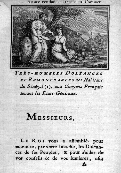 Cahier de Doléances de Saint-Louis du Sénégal (illustration de L'Afrique et le peuple africain considérés sous tous leurs rapports avec notre commerce et nos colonies. De l'abus des privilèges exclusifs et notamment de celui de la Compagnie du Sénégal. Ce que c'est qu'une société se qualifiant d'Amis des noirs de Dominique Harcourt Lamiral, 1789)